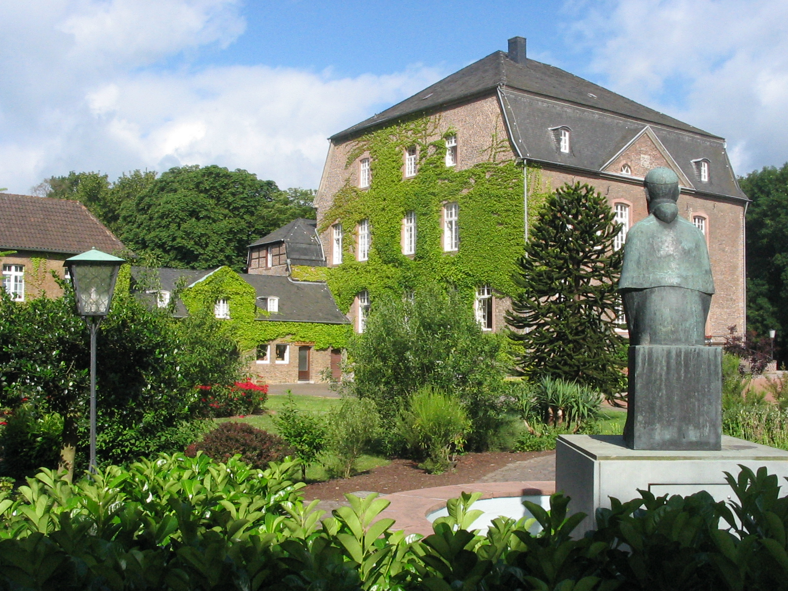 Die Bibliothek des Gymnasiums Haus Overbach im alten Herrenhaus